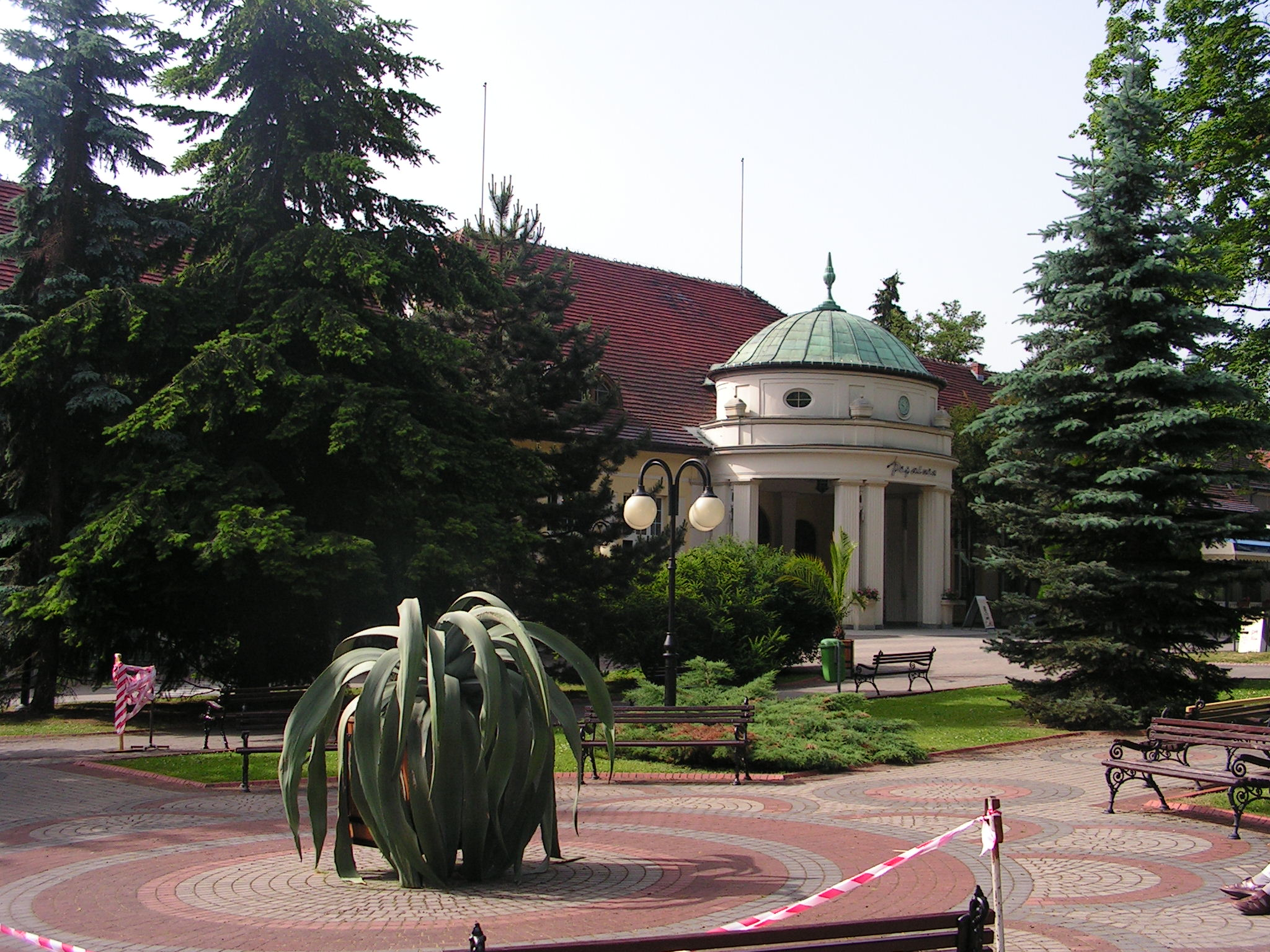 Polanica Zdrój, park zdrojowy, Poland